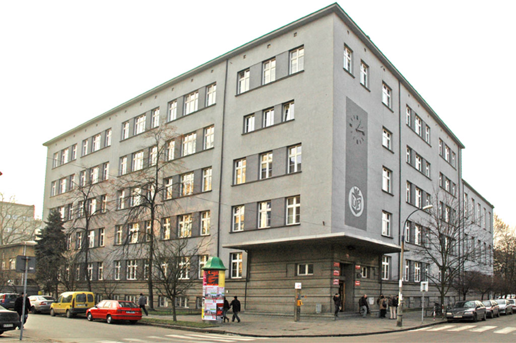 Budynek Wydziału Pedagogicznego Uniwersytetu Pedagogicznego im. KEN, ul. Ingardena 4 Kraków